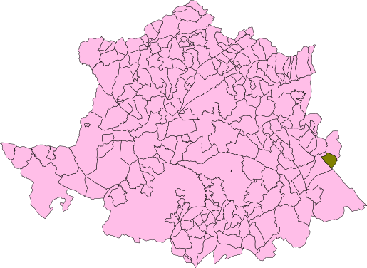 Carrascalejo